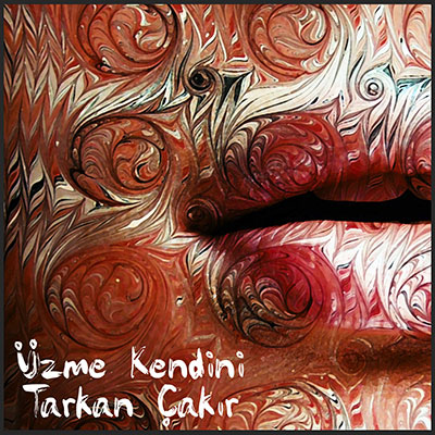 Tarkan Çakır'ın 2017 yılında yayınlanmış Üzme Kendini isimli tekli albüm kapağı.